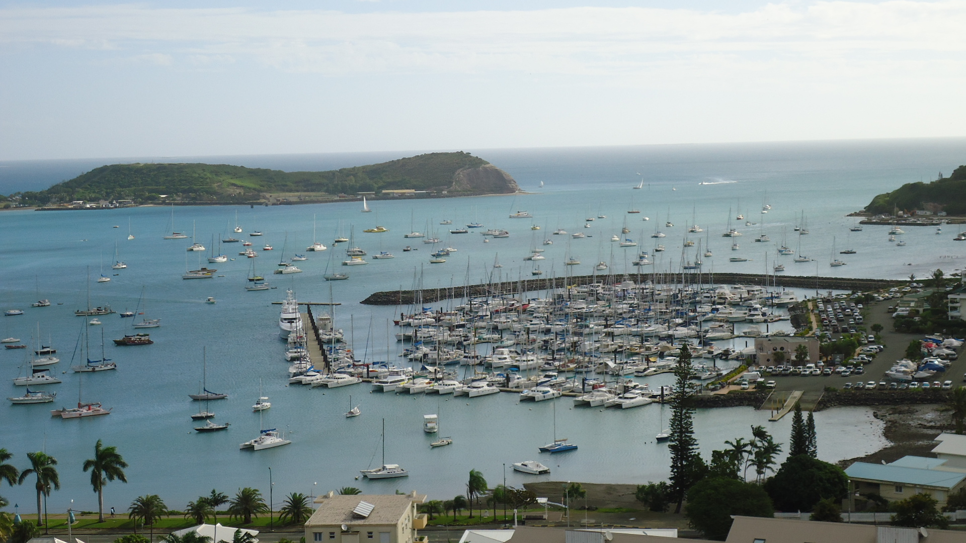 Vue du Port du Sud (baie de l'Orphelinat), depuis le Mont Vénus, à Nouméa